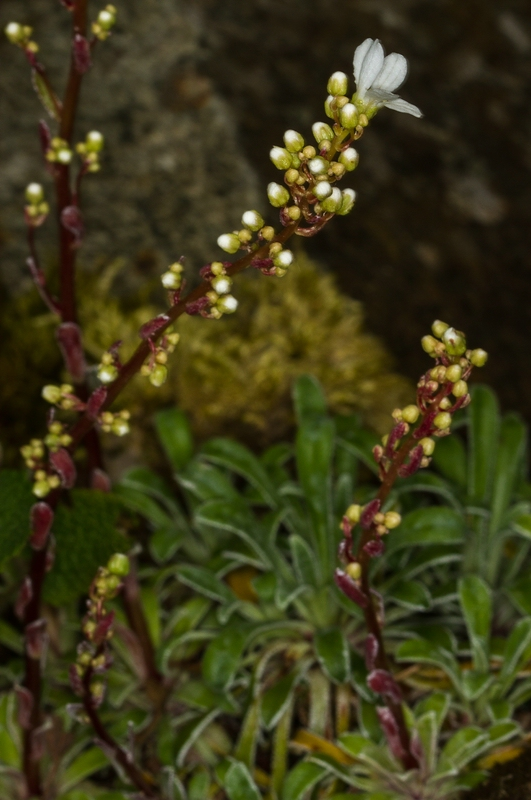 Arktisch-alpiner Garten Chemnitz: Zungen-Steinbrech